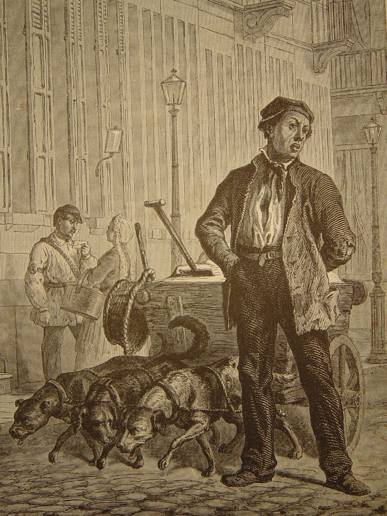 "le marchand de sable" par V. DeDoncker